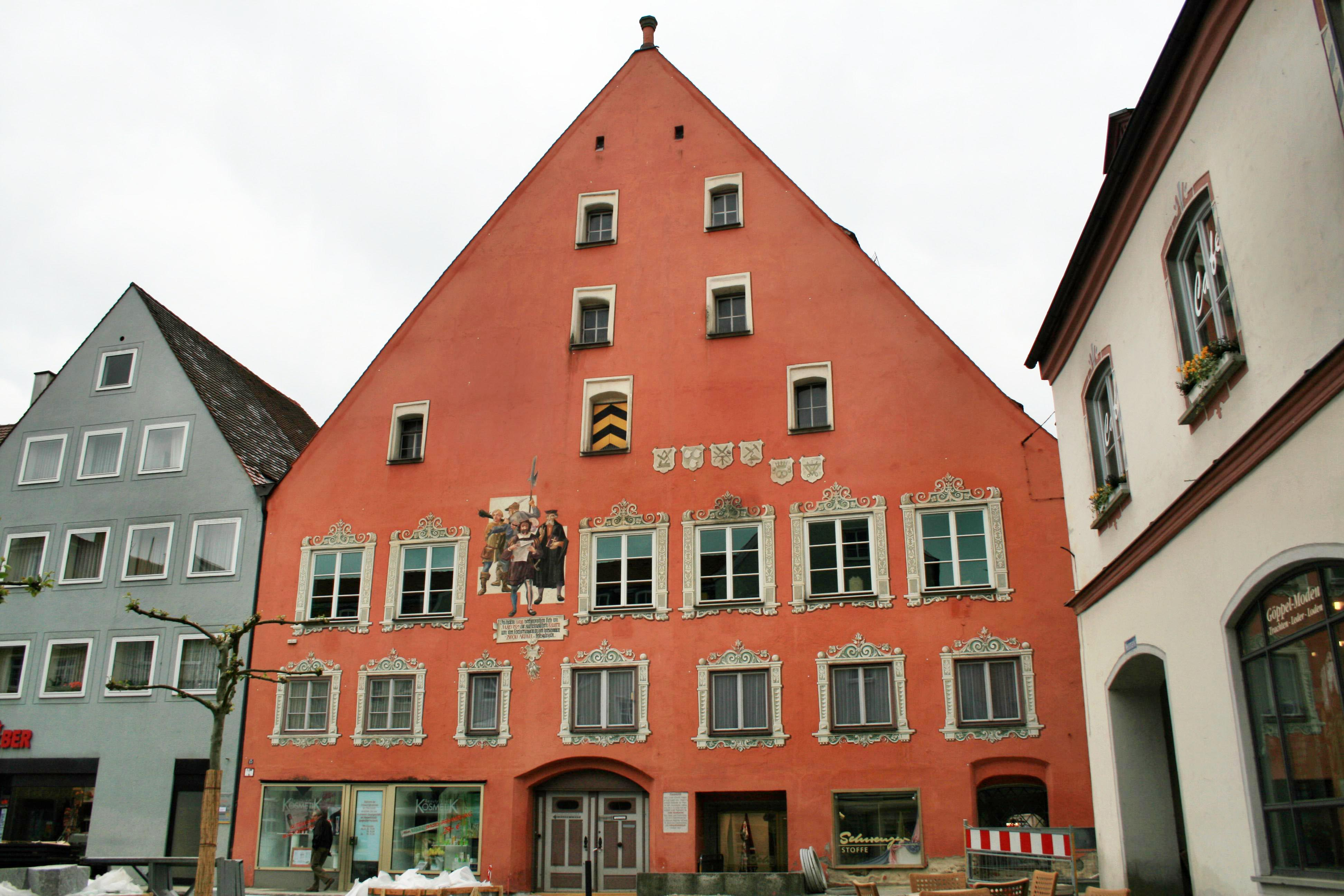 Die Kramerzunft aus dem 14. Jahrhundert. Hier wurden am 24.03.1525 die ersten Menschenrechte der Welt, die 12 Bauernartikel im Bauernkrieg niedergeschrieben